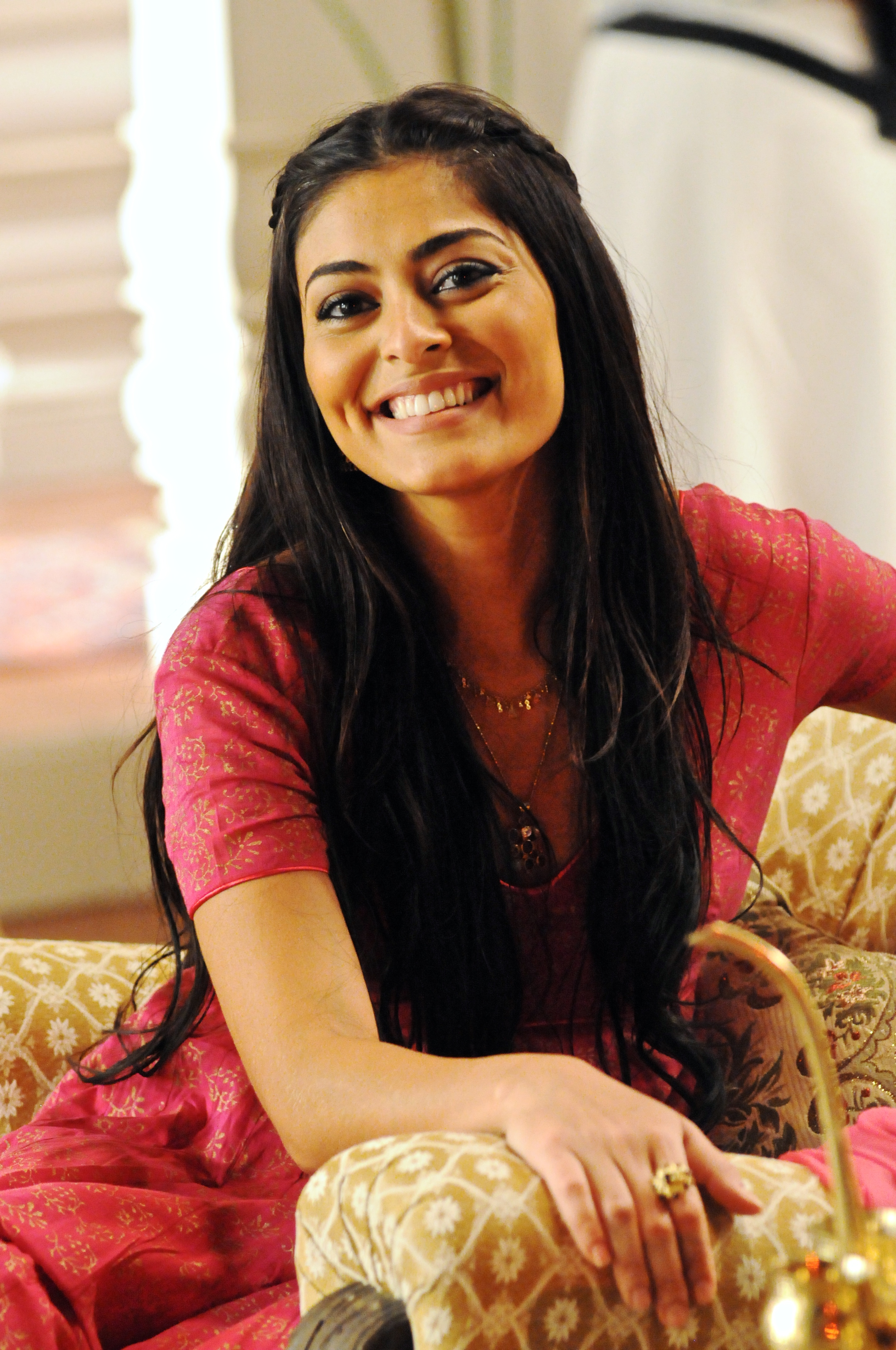 Juliana Paes no "Café com Glória", um bate-papo com Glória Perez sobre a nova novela das 8h, Caminho das Índias.